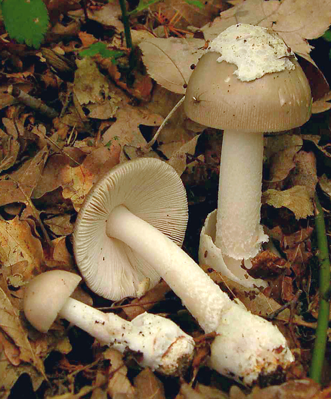 Amanita vaginata (Bull.) Lam.